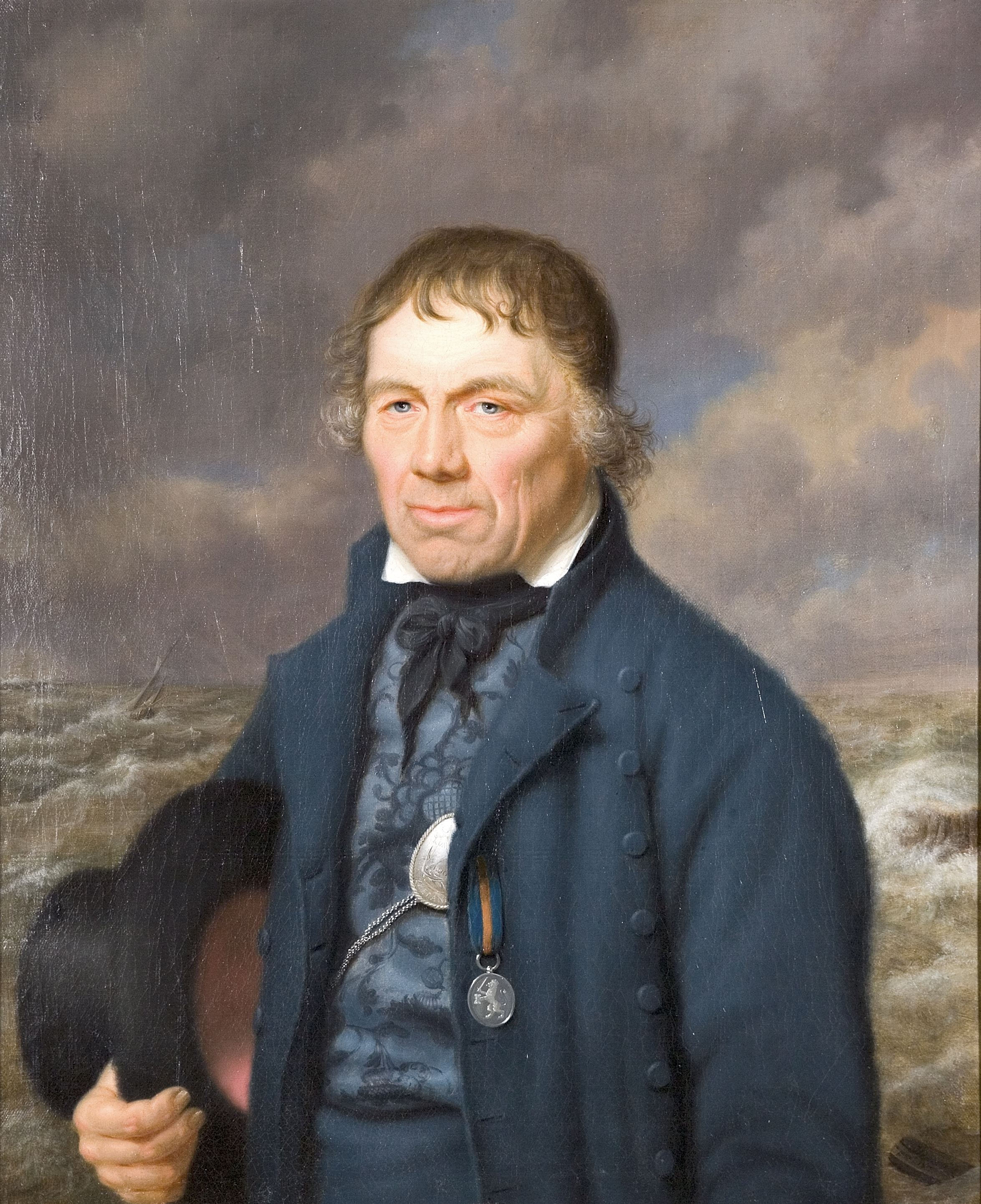 Geboren te Veere 1748, overleden te Goes 1818. Loods te Vlissingen en sluiswachter Sas te Goes. Loods en visser te Vlissingen en sasmeester te Goes. Portret voor het eerst geëxposeerd in Museum Middelburg, 1817. Bij de presentatie aan Koning Willem I stond Naerebout naast het schilderij, waarop de koning de gelijkenis 'frapant' achtte. (Notitie 1822 RAZ)